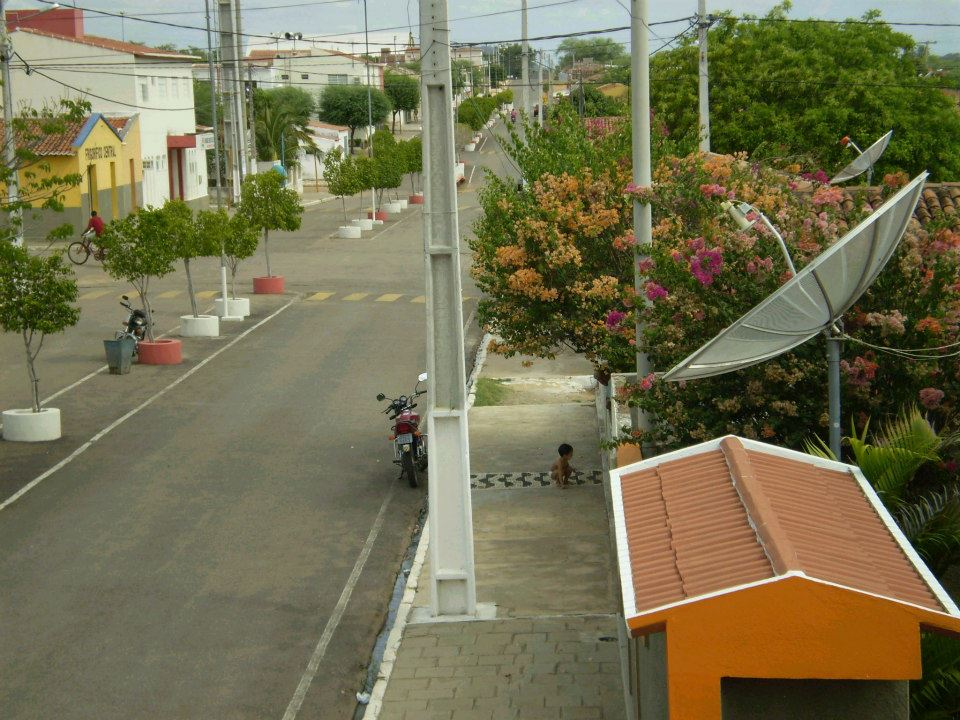 Vista Parcial de Ipueira,RN. Fotografia tirada por José Rildo da Nobrega Alencar.